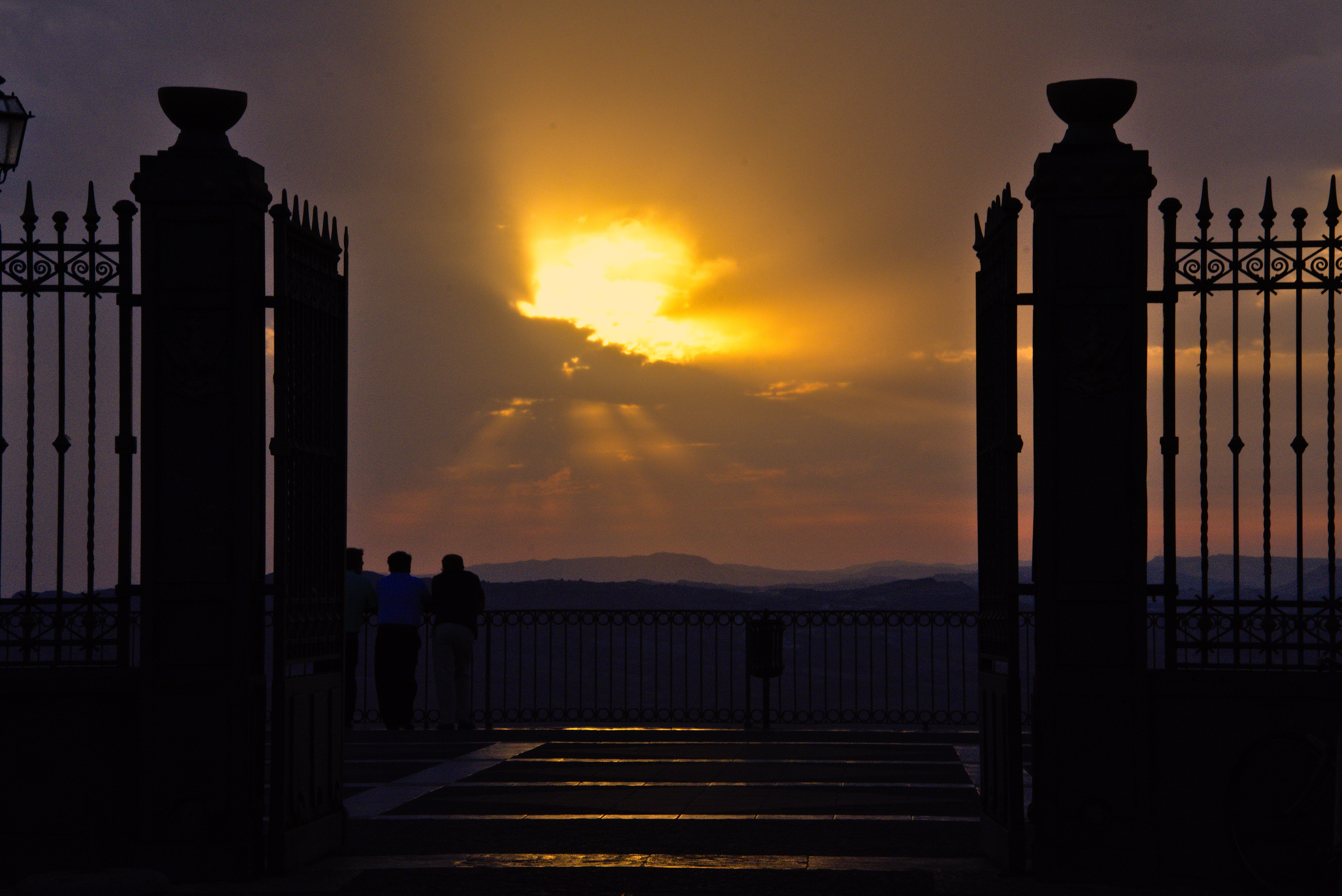 Terrazzo del Belvedere This is a photo of a monument which is part of cultural heritage of Italy.